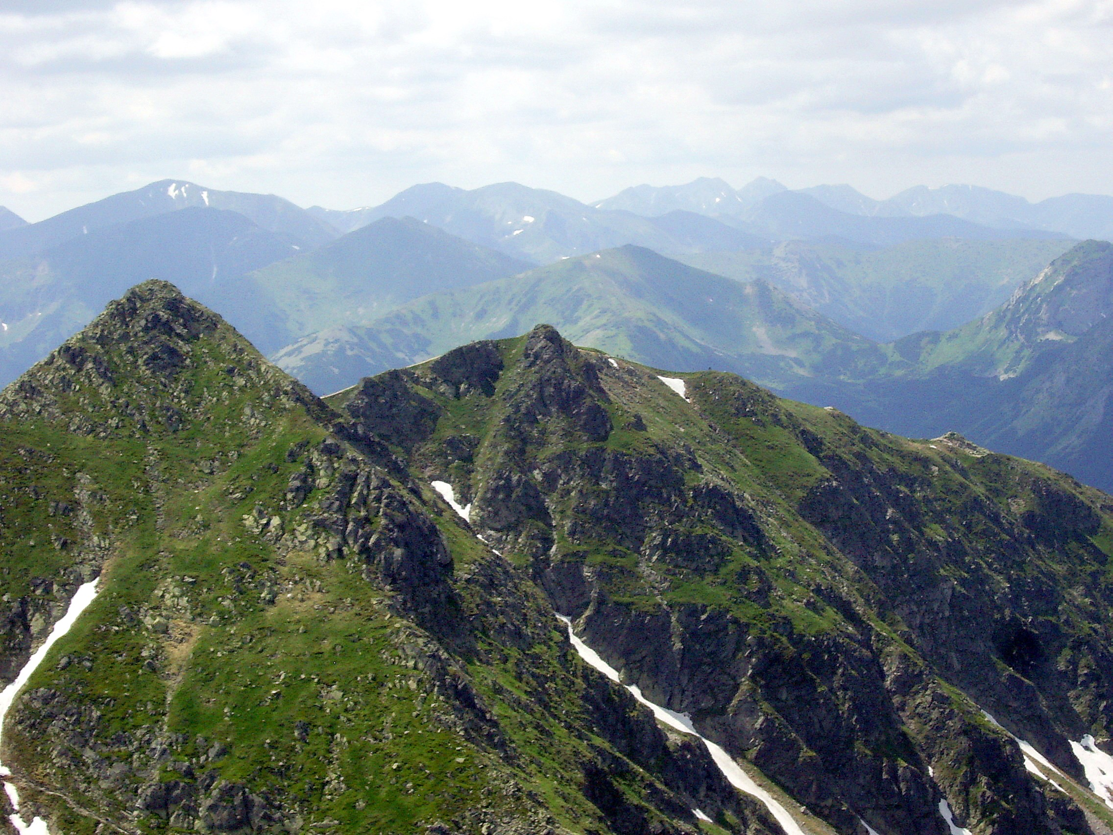 Widok z Kościelca na Pośrednią i Skrajną Turnię, w tle Tatry Zachodnie